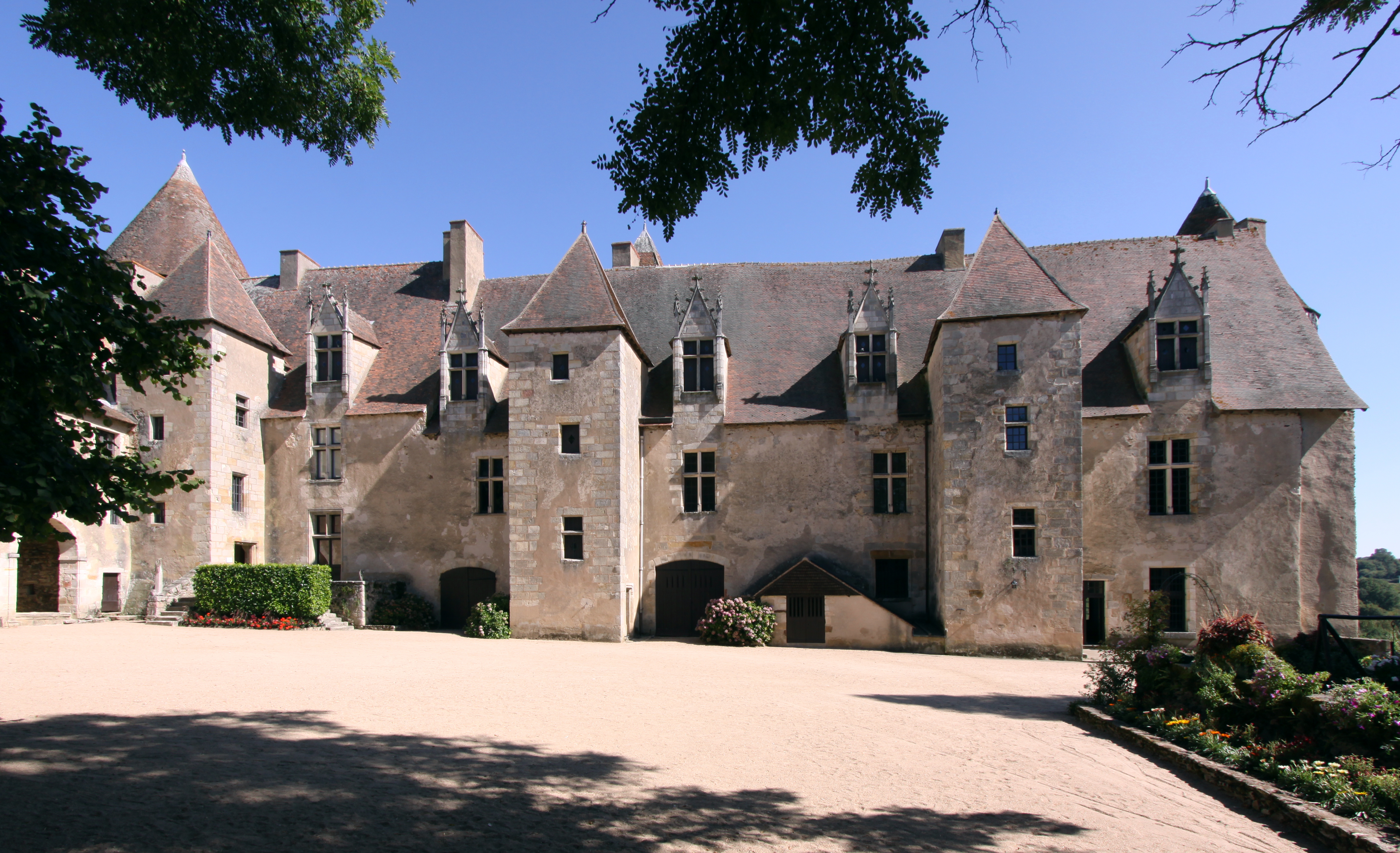 Burg Culan im französischen Département Cher - Hofseite